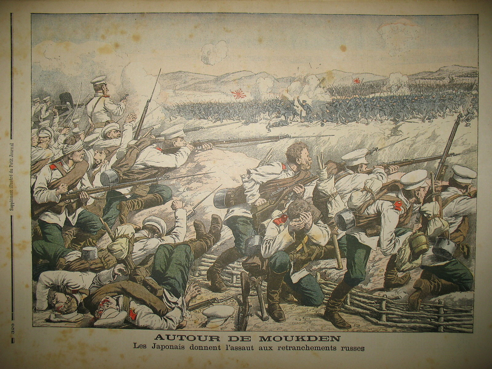 Bataille de Moukden, février-mars 1905.